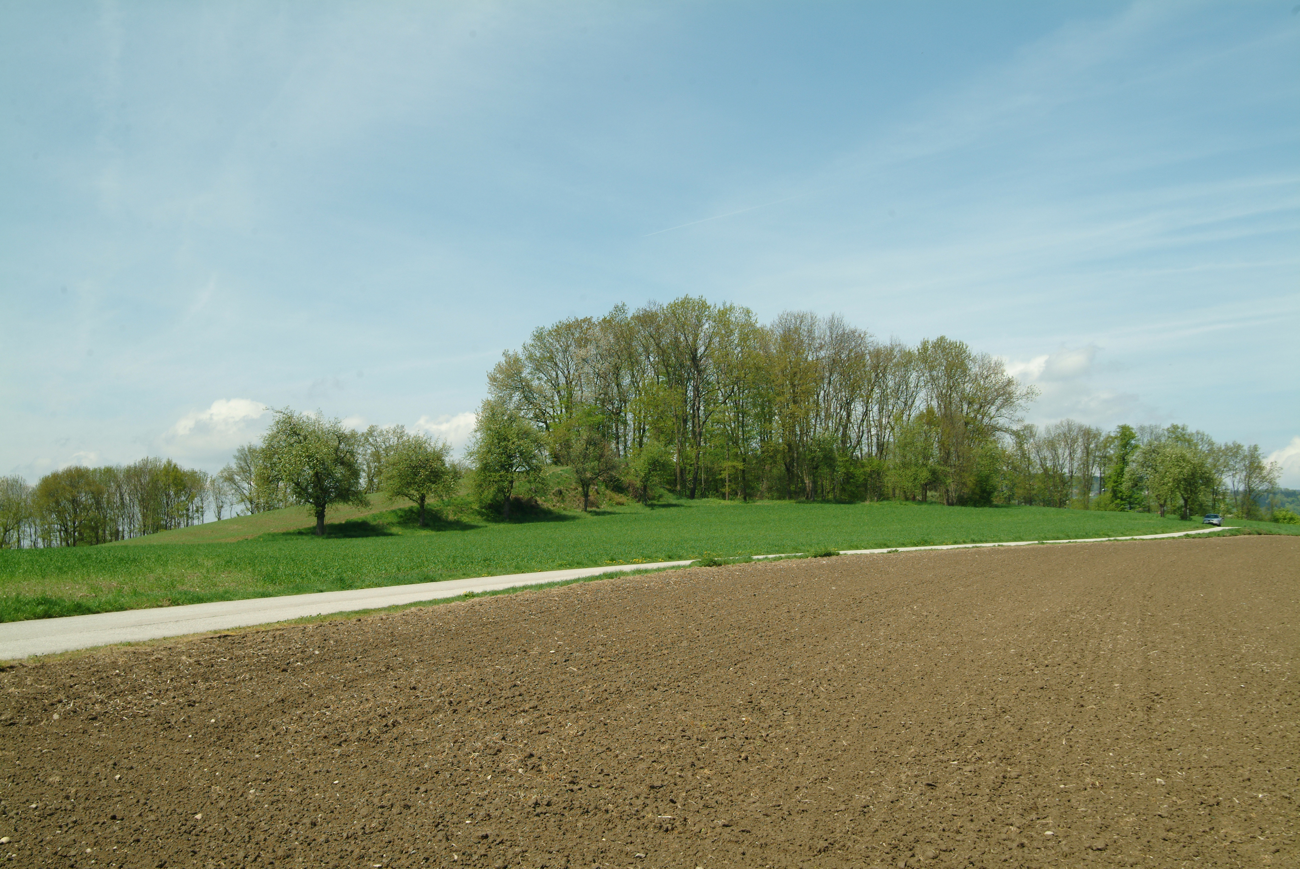 Turmbefestigung Linz - Standort des Turm 14